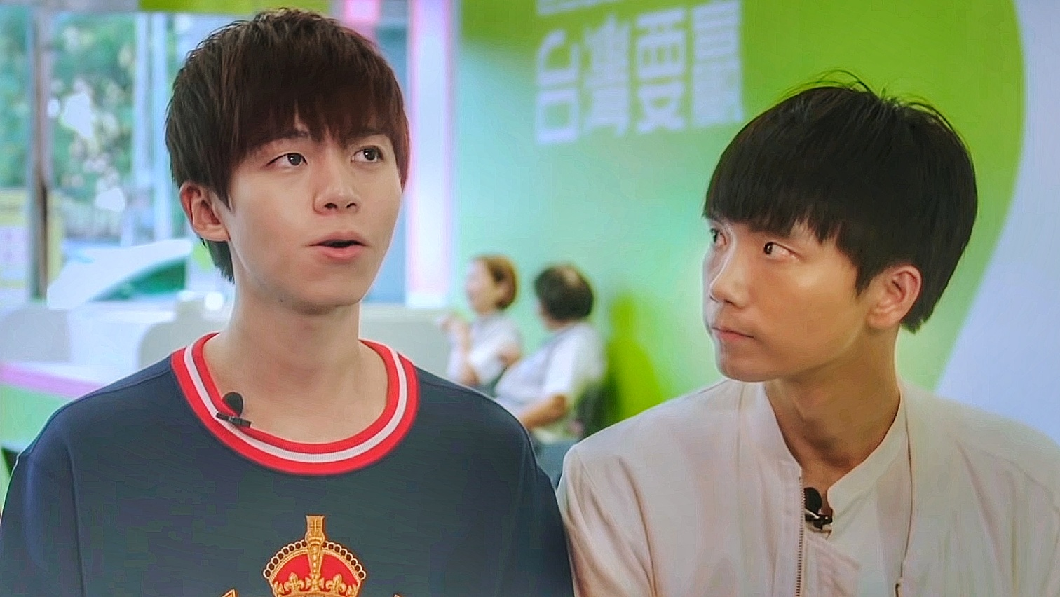 黃氏兄弟